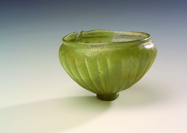 Glasschale aus dem Gräberfeld von Hallstatt. Sie zählt zu den frühesten Belegen von Glasgefäßen in Mitteleuropa nördlich der Alpen und dürfte wahrscheinlich aus dem oberen Adriaraum stammen.